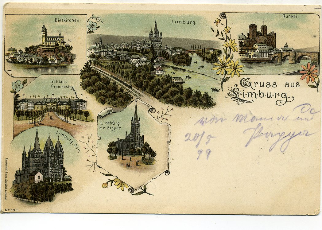 Gruss aus Limburg -1899 Dietkirchen- Runkel - Schloss Oranienstein - Limburg Dom - Limburg Ev. Kirche